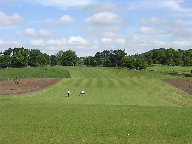 Ballumbie Golf Course, nr Dundee